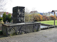 Die Brunnenanlage.Ganz rechts das Goethe-Wanderweg-Schild